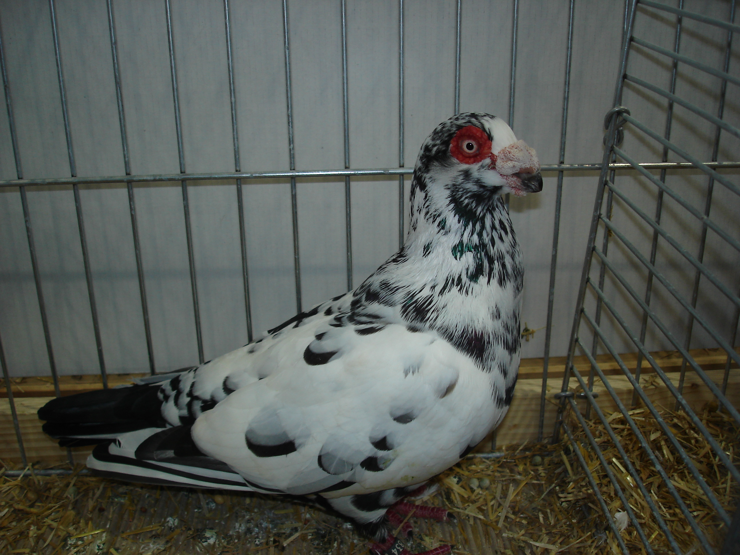 Zdjęcie gołębia rasy indian